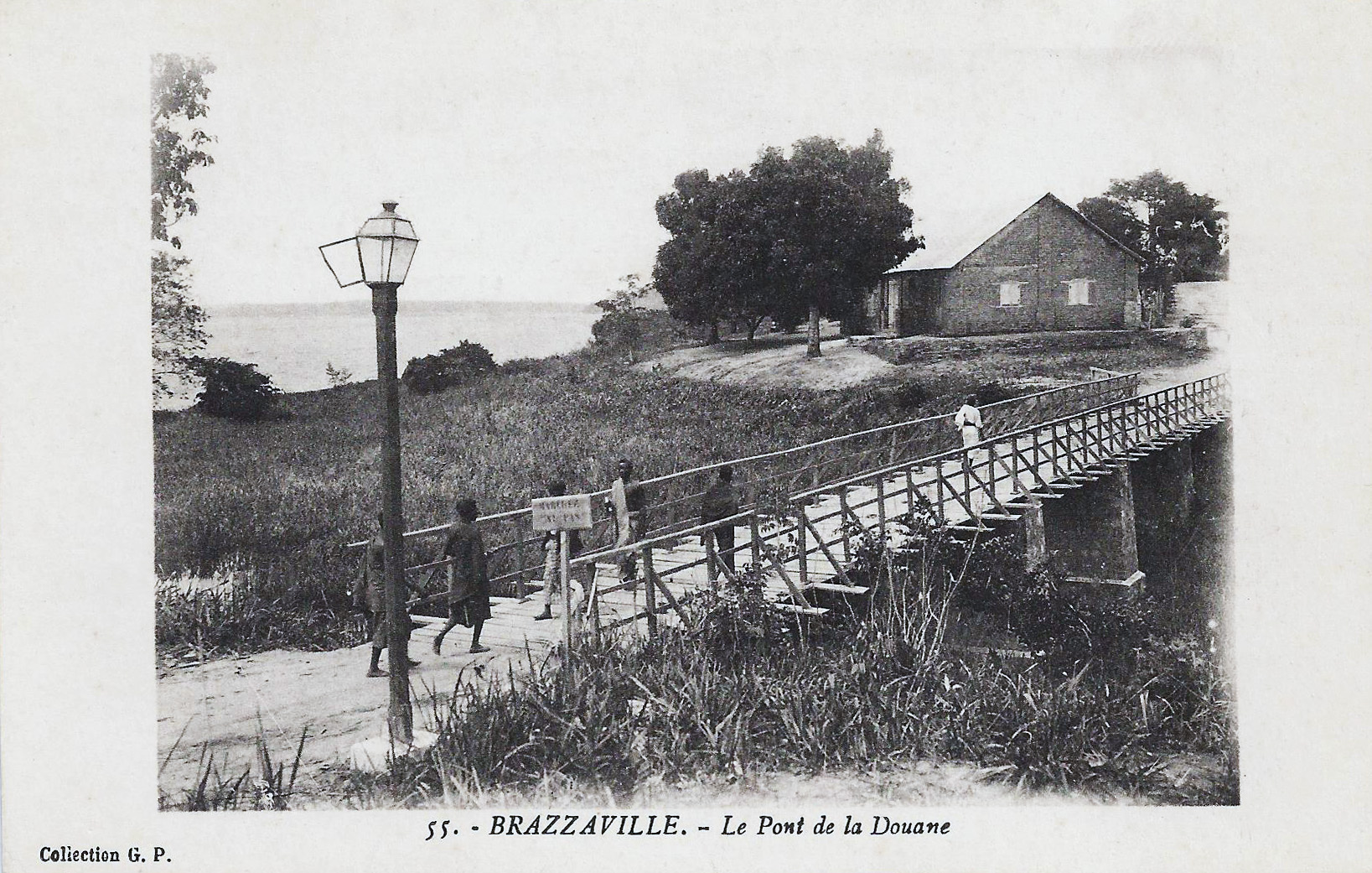 Brazzaville. Le Pont de la Douane. Collection G.P.